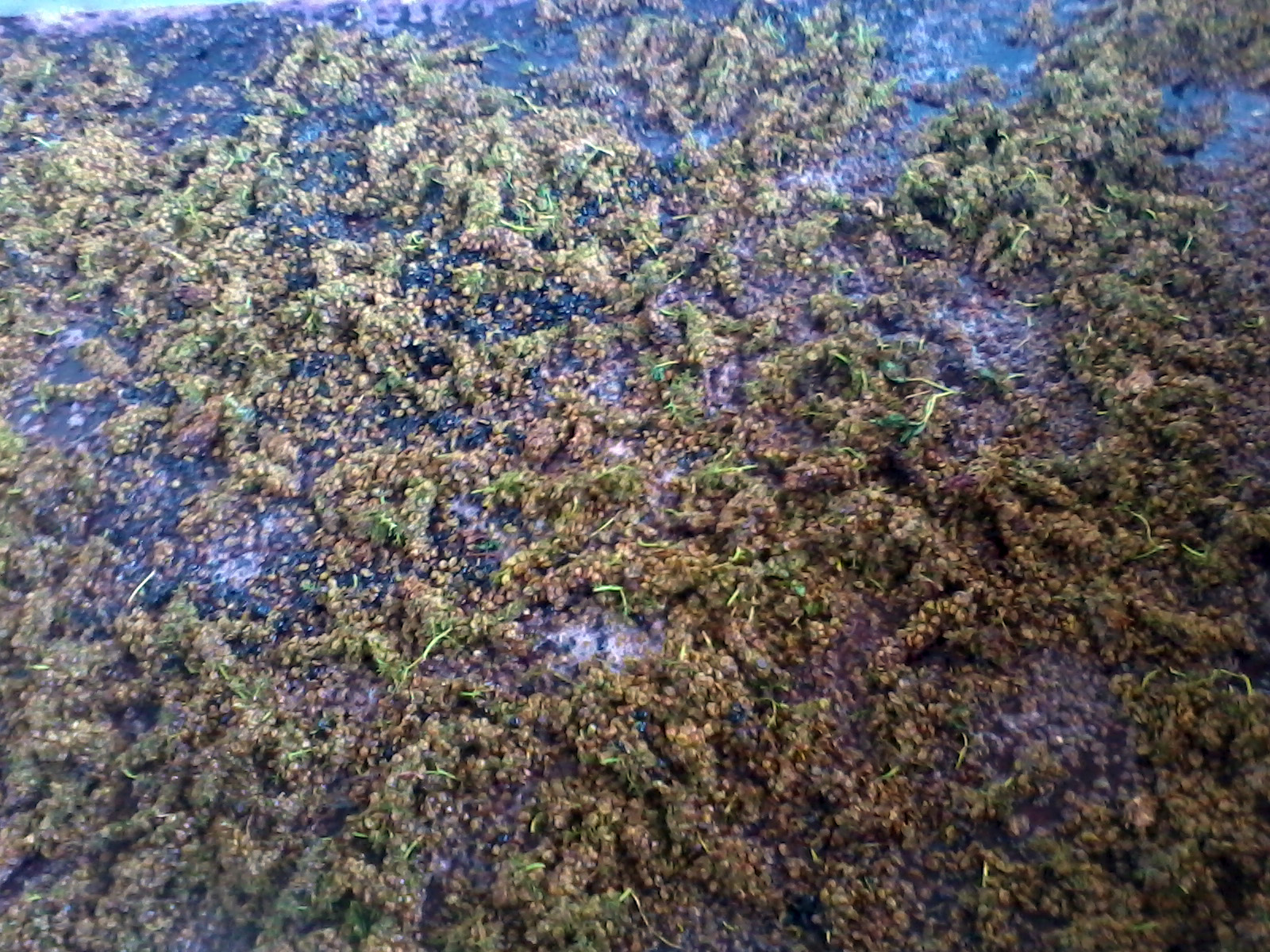 Cofermentation